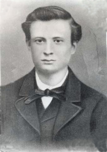 Carl Ulrich, Aufnahme aus dem Jahr 1870